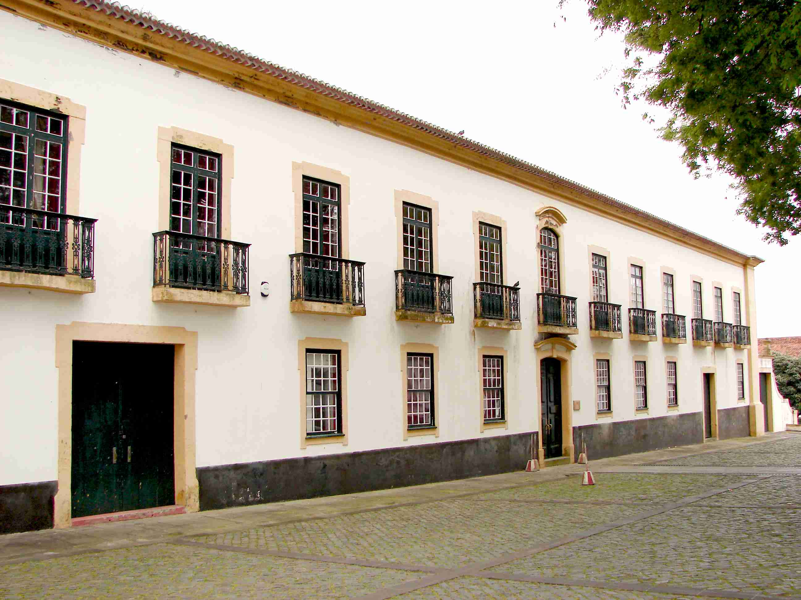 Palácio dos Capitães Generais, Exterior, ilha Terceira, Açores, Portugal.